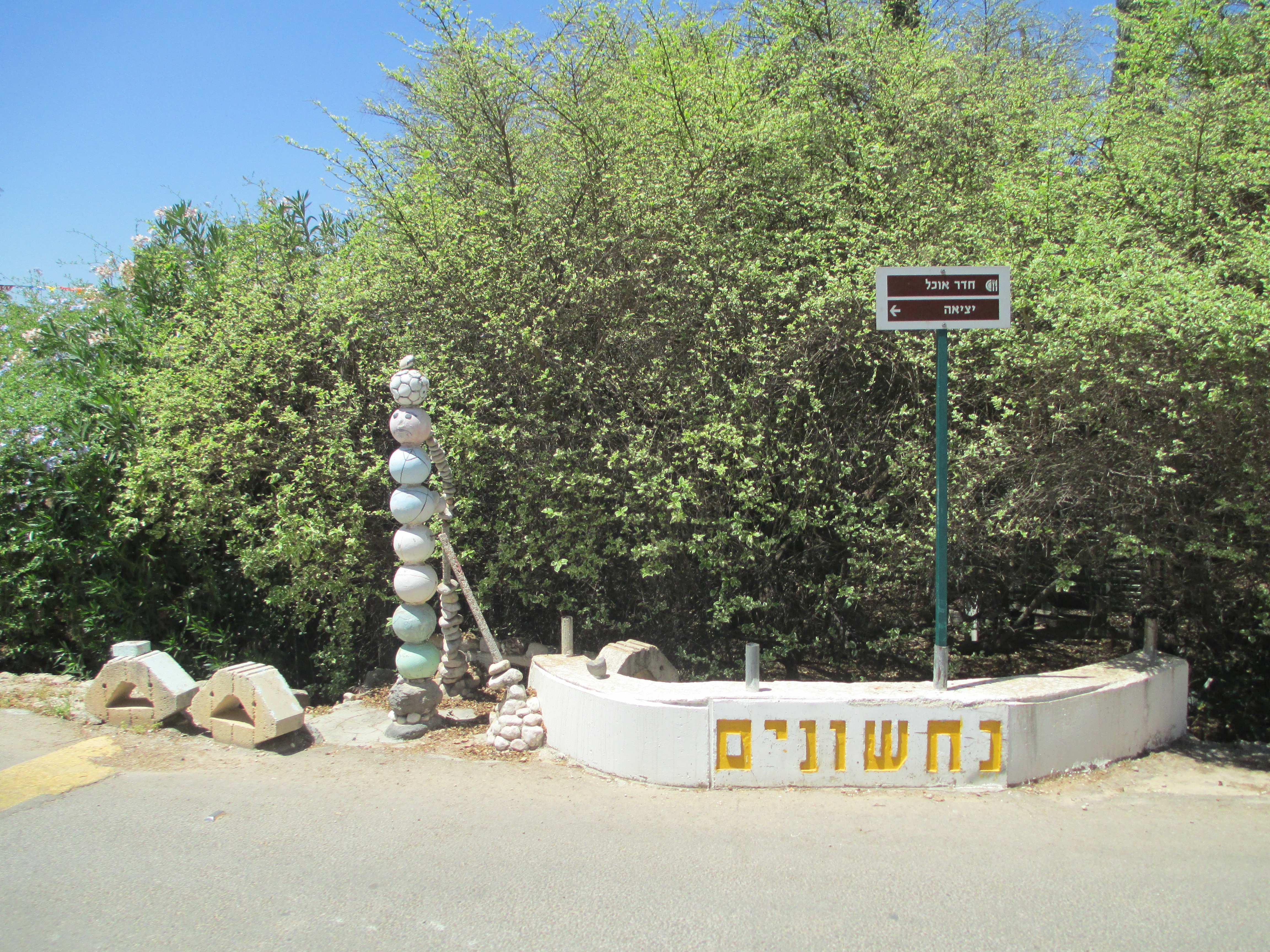 קיבוץ נחשונים